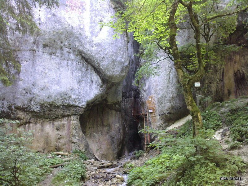 Canionul Sapte Scari se află la 1 și 1/4 ore depărtare de Timișul de Jos, în Masivul Piatra Mare din Muntii Baiului, fiind unul din cele mai mari din țară, usor accesibil, nu necesită echipament special, acesta având amenajate diferite scări,podețe și balustrade usurănd ascensiunea.